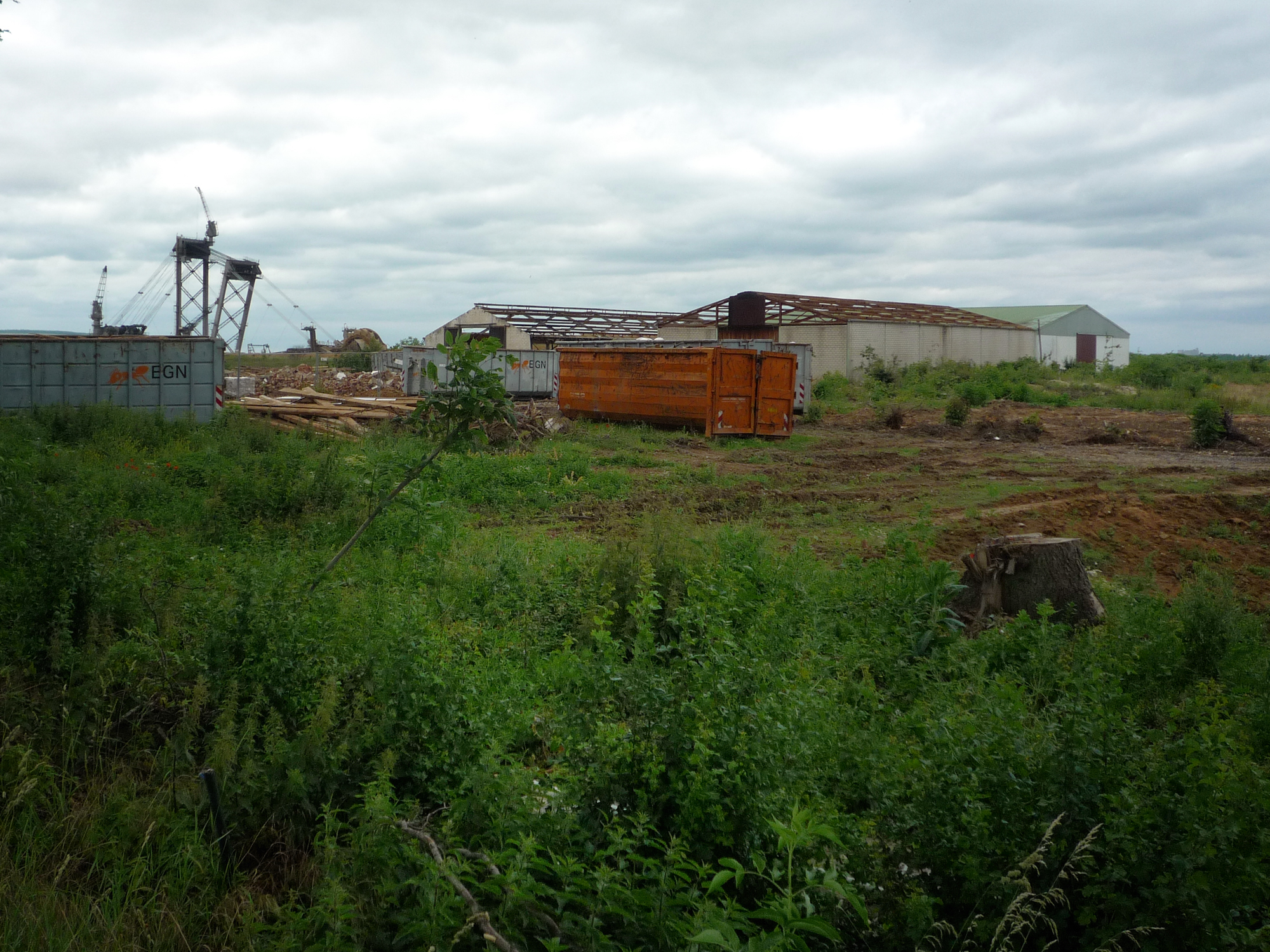 Tanneck während des Abrisses im Jahr 2011 mit Schaufelradbagger am linken Bildrand